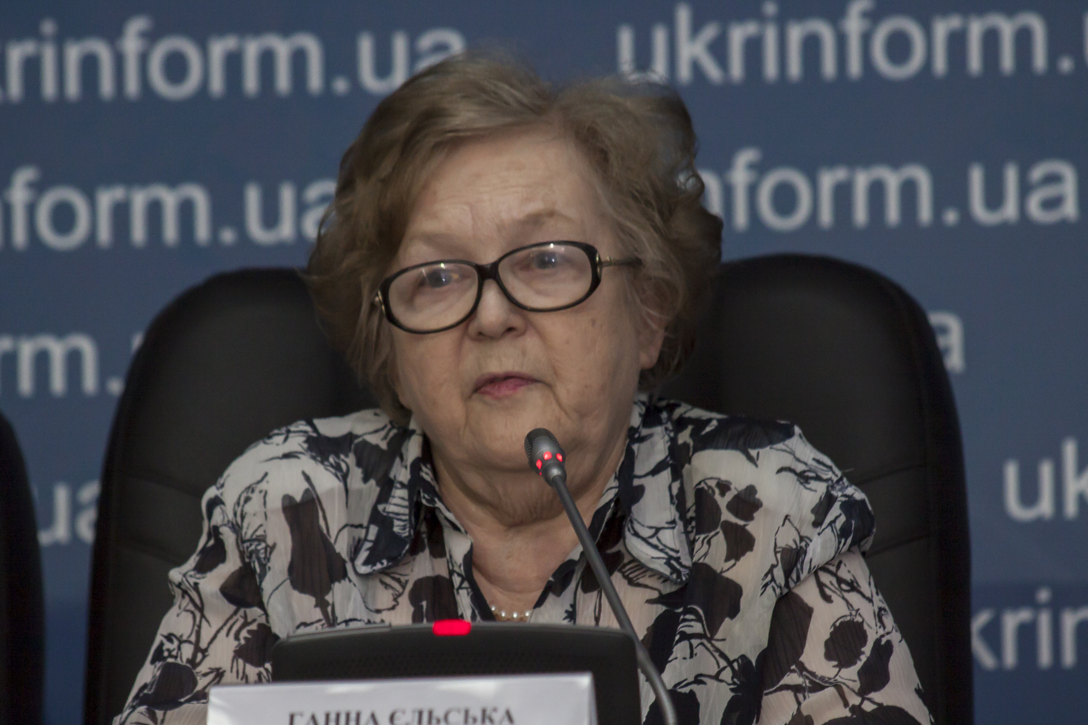 Фото українського молекулярного біолога Анни Єльської (2017)